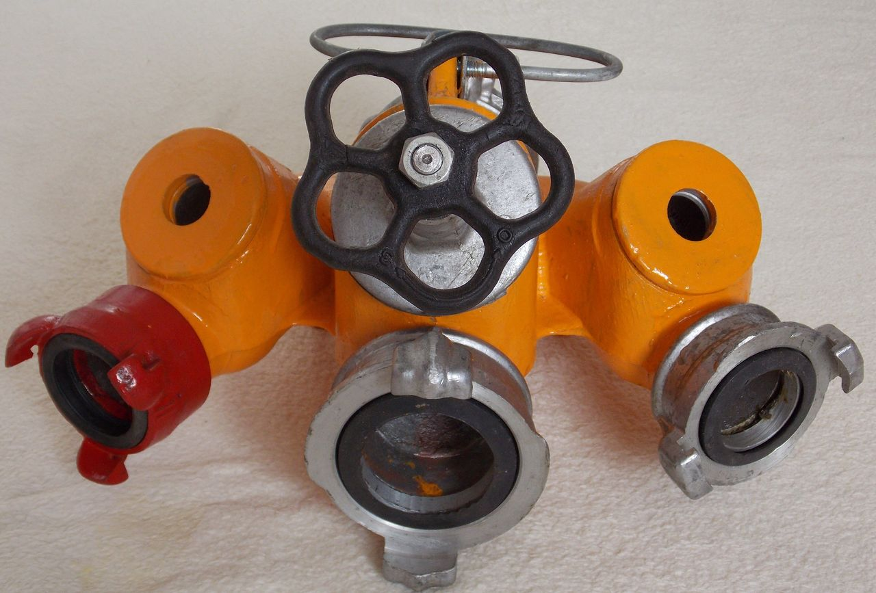 Разветвление трехходовое спортивное РТ-70